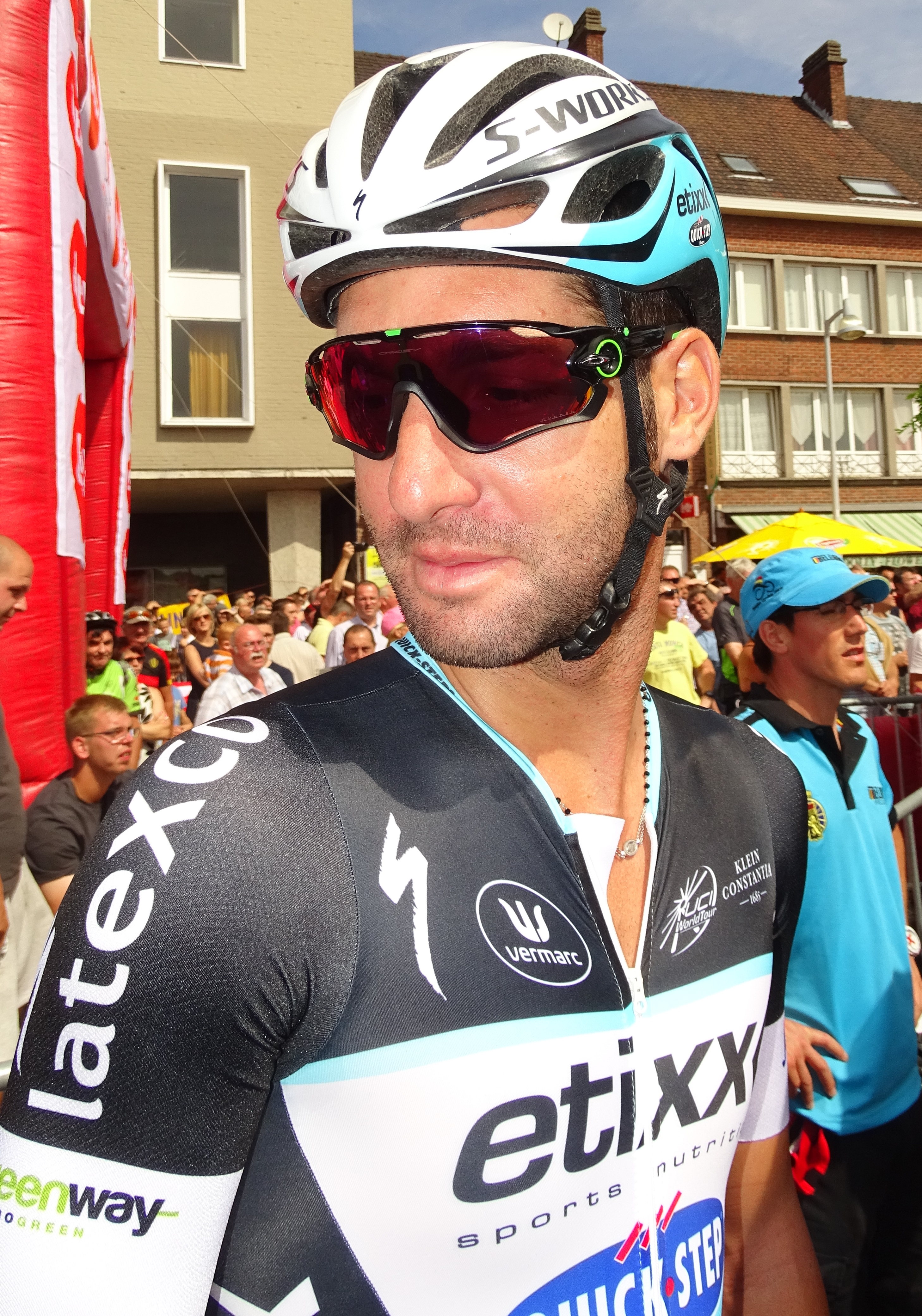 Reportage réalisé le mercredi 22 juillet à l'occasion du départ du Grand Prix Pino Cerami 2015 à Saint-Ghislain, Belgique.